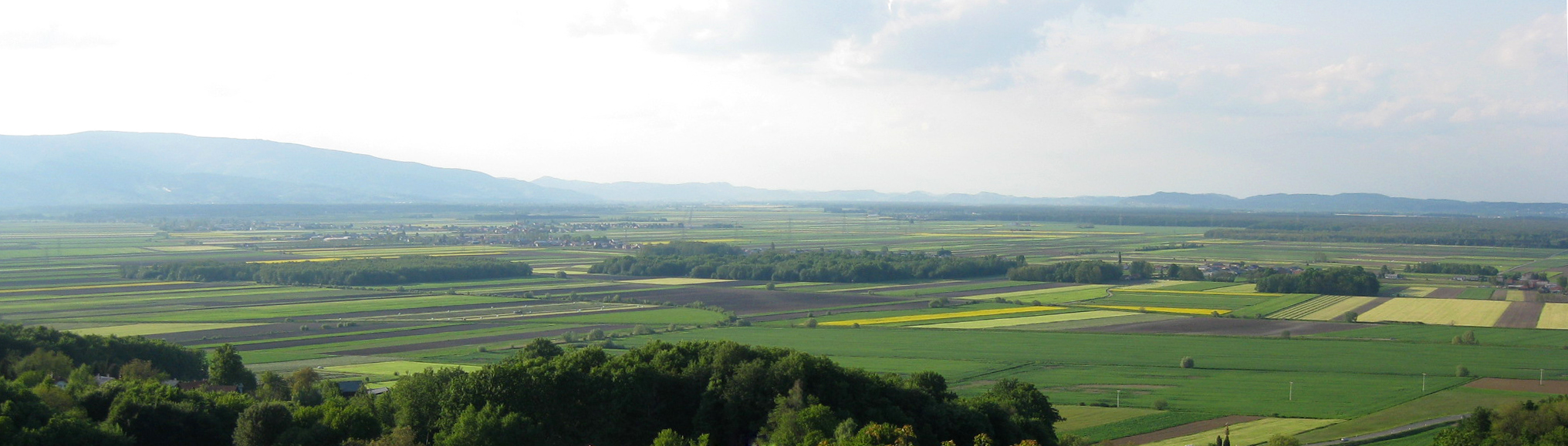 Dravsko polje, geographical region in Slovenia (near Maribor), view from Ptujska gora.